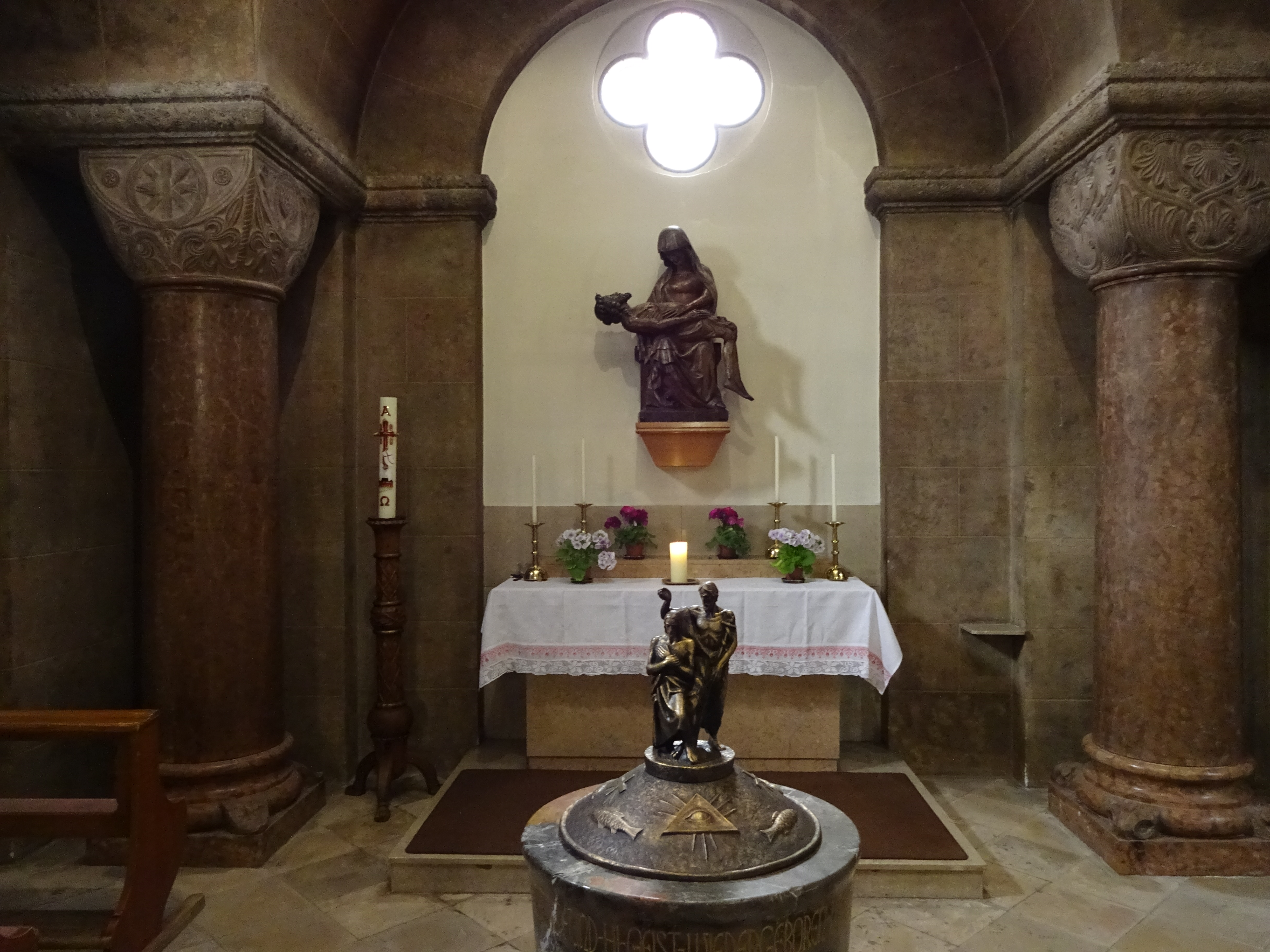 Pfarrkirche Pradl: Taufkapelle mit Pietà aus dem 15. Jh. This media shows the remarkable cultural object in the Austrian state of Tyrol listed by the Tyrolean Art Cadastre with the ID 16406. (on tirisMaps, pdf, more images on Commons, Wikidata)